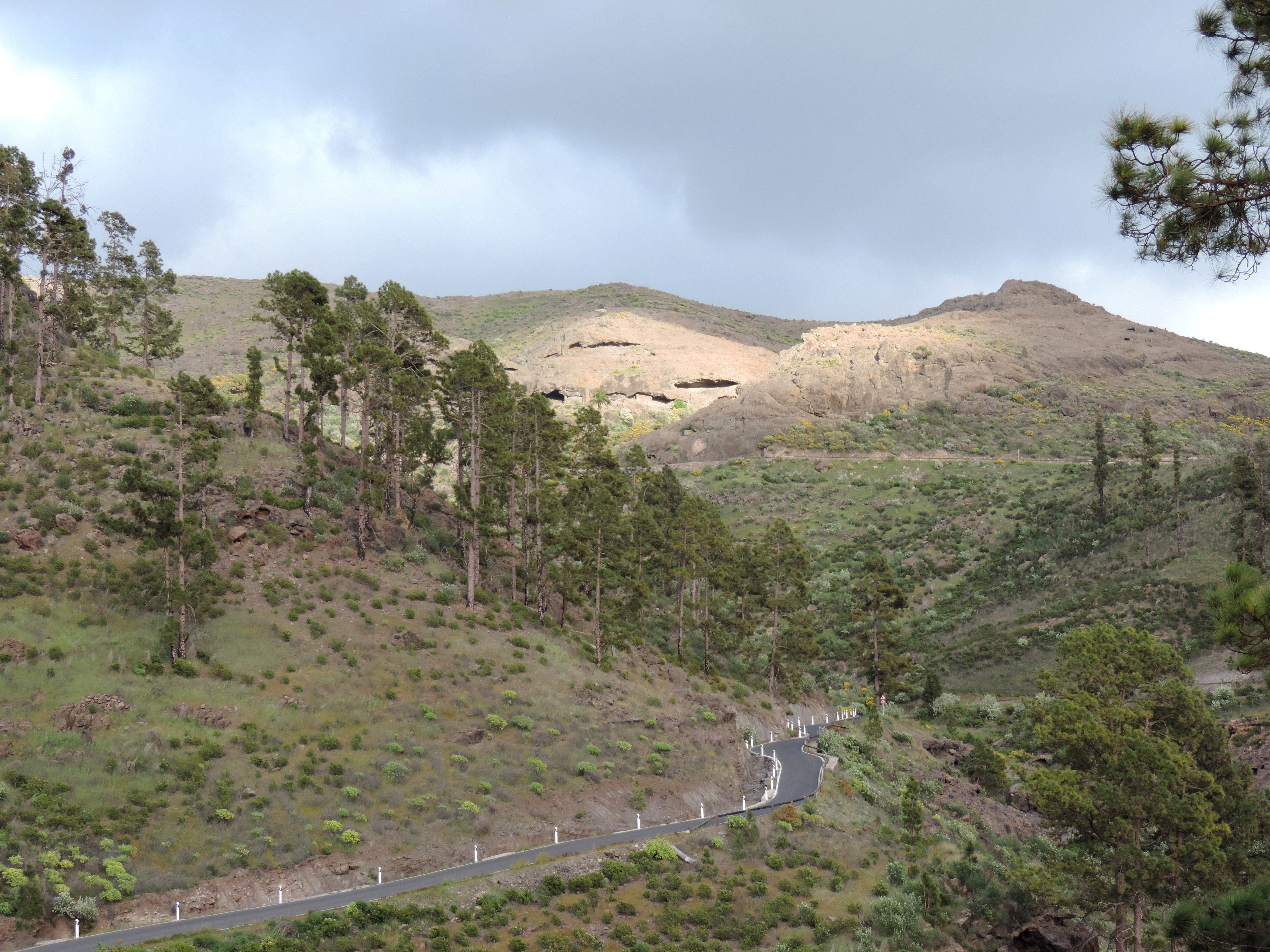 Risco Grande